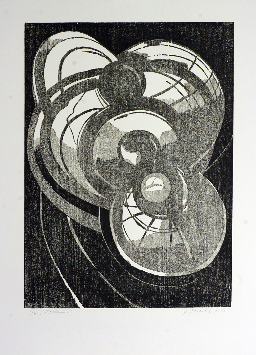 Jan Holoubek, Prolínání, dřevořez, 2010